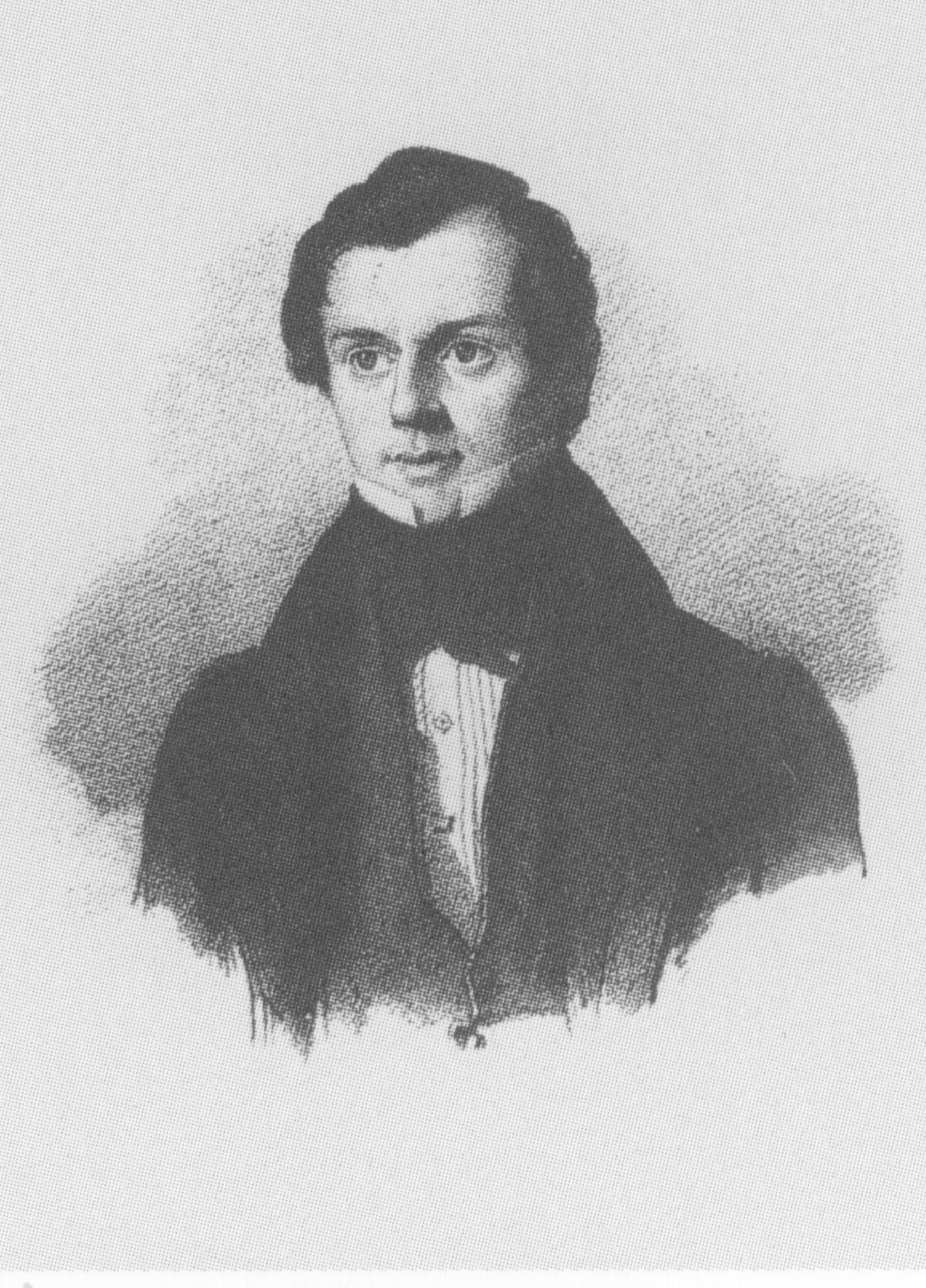 Porträt von Albert von Carlowitz (1802–1874), deutscher Politiker